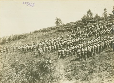 Войници от Осемдесети пехотен полк.